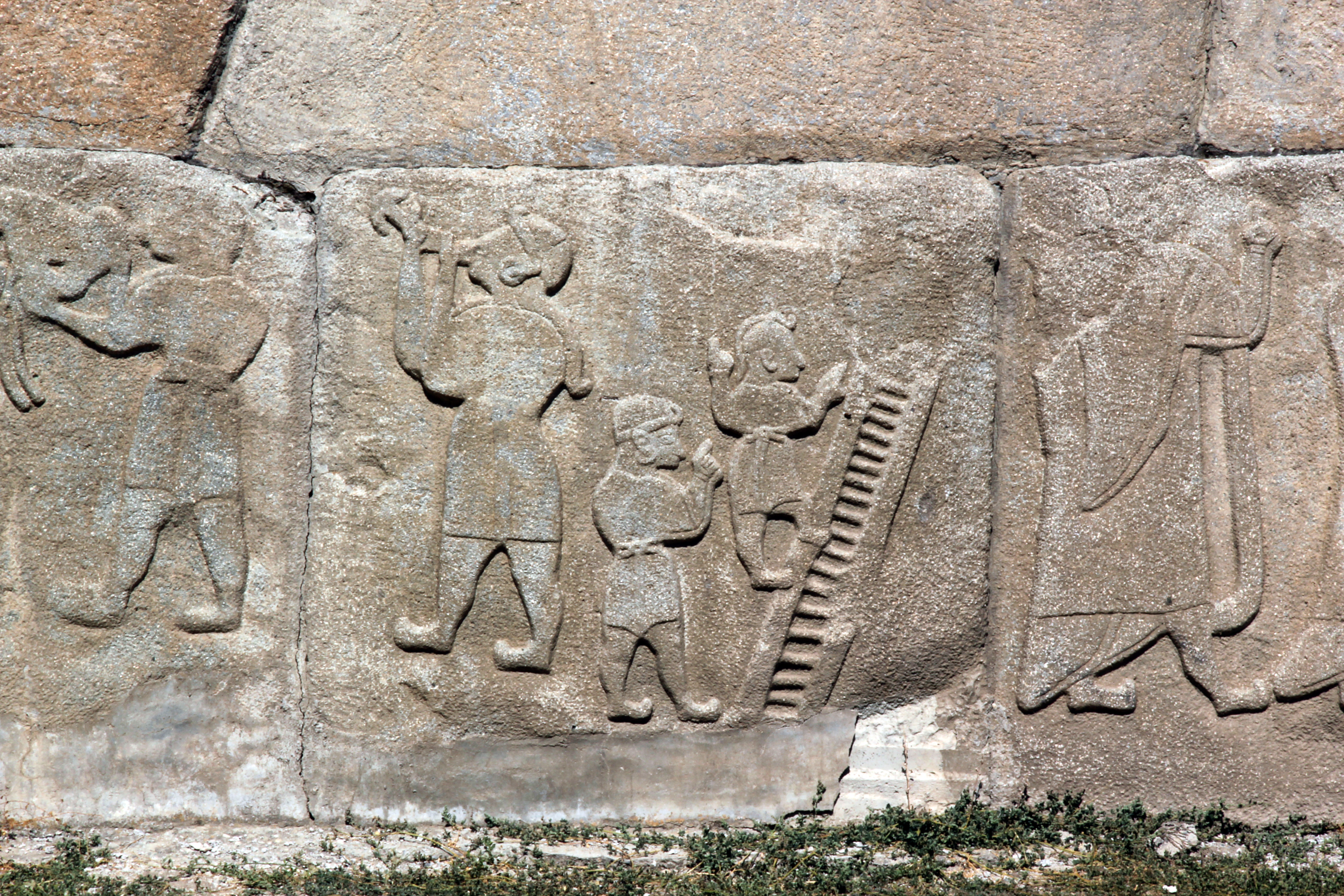 Alaca Höyük, Siedlungshügel in Zentralanatolien, Orthostatenreihe am Eingang, linke Seite, Block 3, Gaukler und Musikanten - Die hier gezeigten Reliefs sind Repliken, die Originale stehen im Museum für anatolische Zivilisationen in Ankara